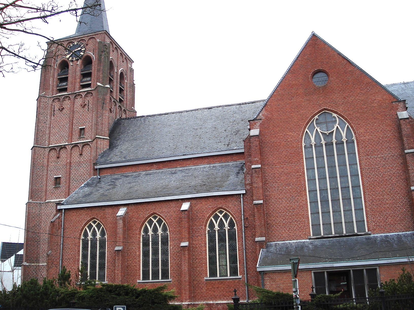 Sint-Amelbergakerk te Wechelderzande, deelgemeente van Lille, prov. Antwerpen, België.